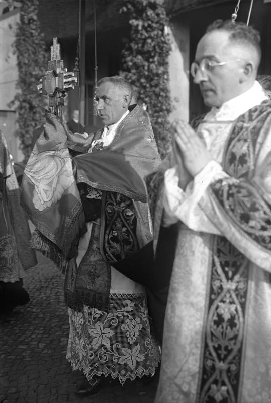 Der Papstkrönungstag in Berlin ! Zur Feier der 10. jährigen Wiederkehr des Krönungstages Papst Pius XI. hielt der päpstliche Nuntius in Berlin Cesare de Orsenigo eine feierliche Messe in der St. Michaels-Kirche in Berlin ab. An dem Gottesdienst nahmen neben dem Reichskanzler Dr. Brüning viele katholische Vereine und Studentenverbindungen teil. Der päpstliche Nuntius mit dem Allerheiligsten bei der Feier.